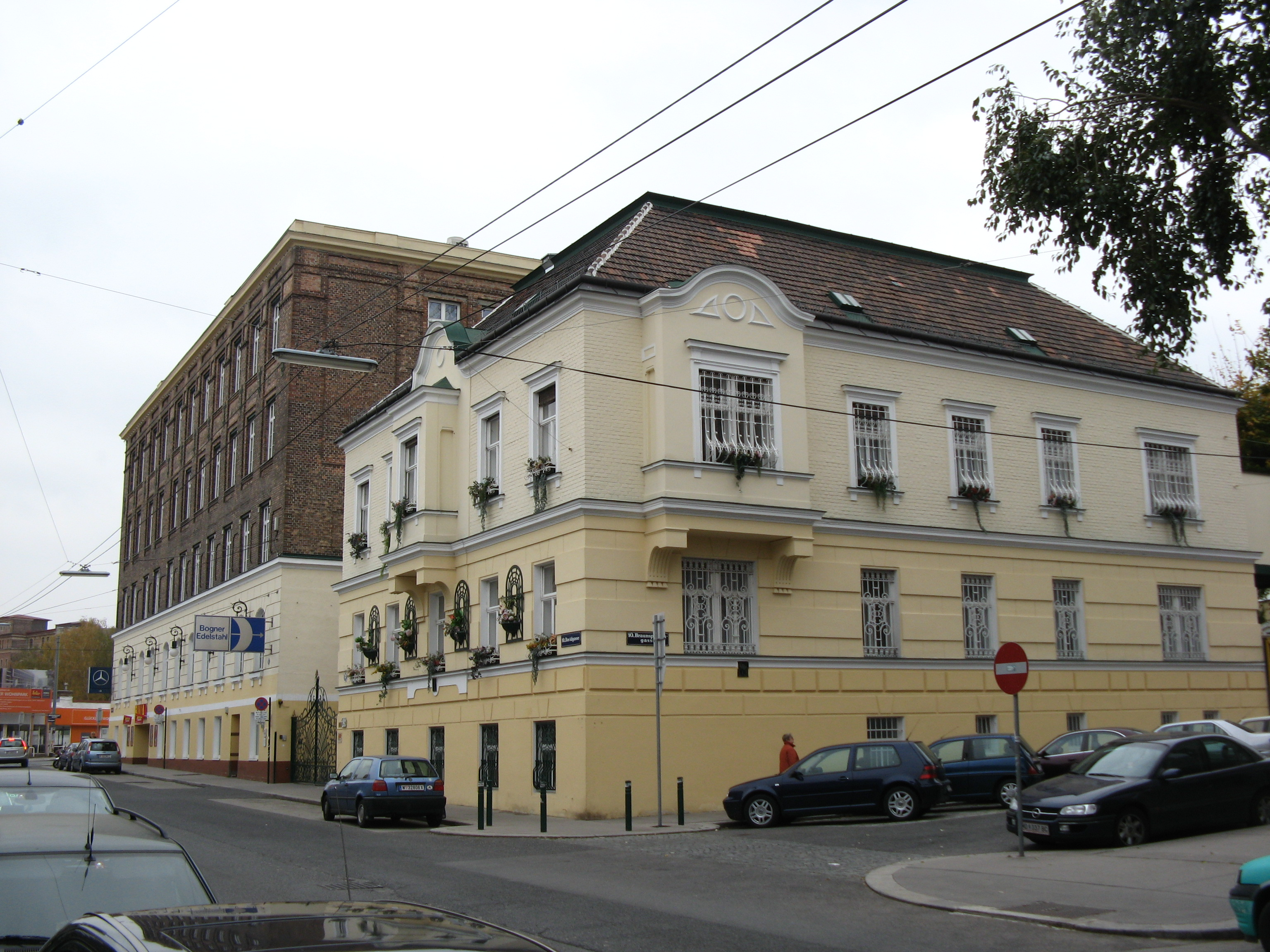 Ehemalige Papierfabrik Reiß mit anschließendem ehemaligem Wohnhaus (1908), Davidgasse 85-87 und 89, Wien-Favoriten